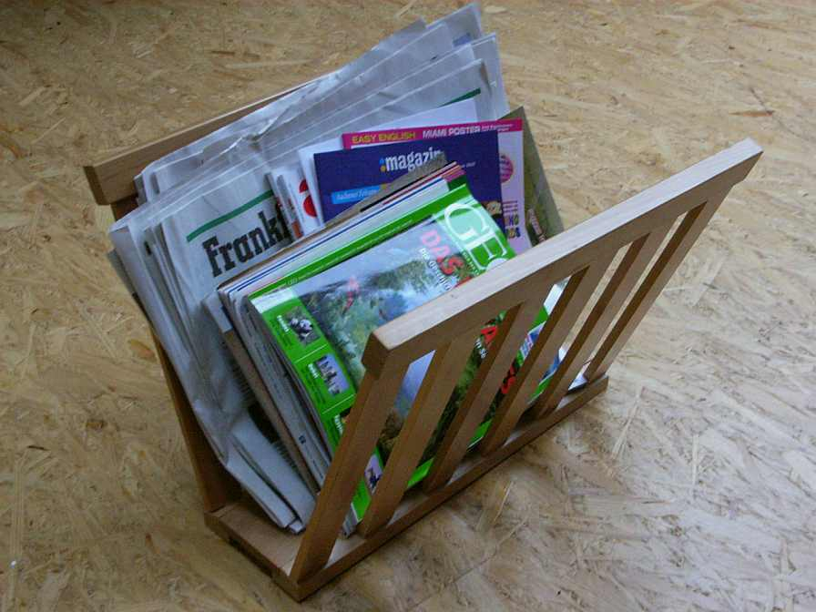 Zeitungsständer /-sammler / Magazine holder